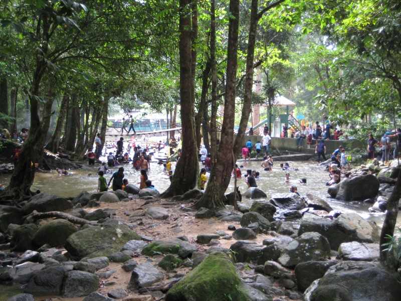 Kolam mandi bertingkat Jeram Lenang